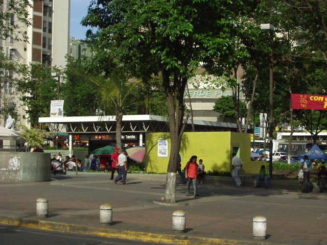 Palo Verde Station of Caracas Metro. Sucre municipality, Miranda state, Venezuela.